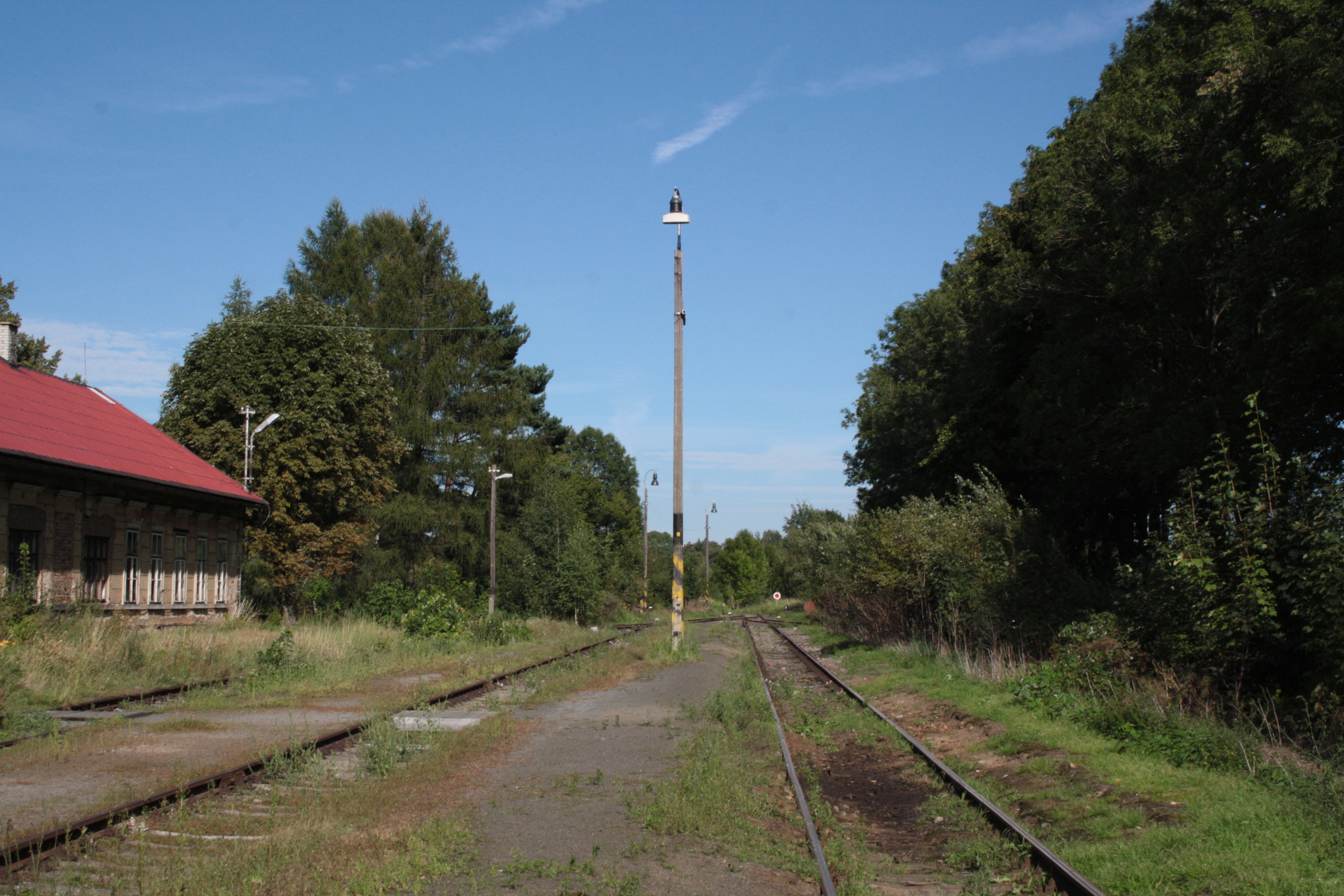 Koncové kolejiště v železniční zastávce v Jindřichovicích pod Smrkem.